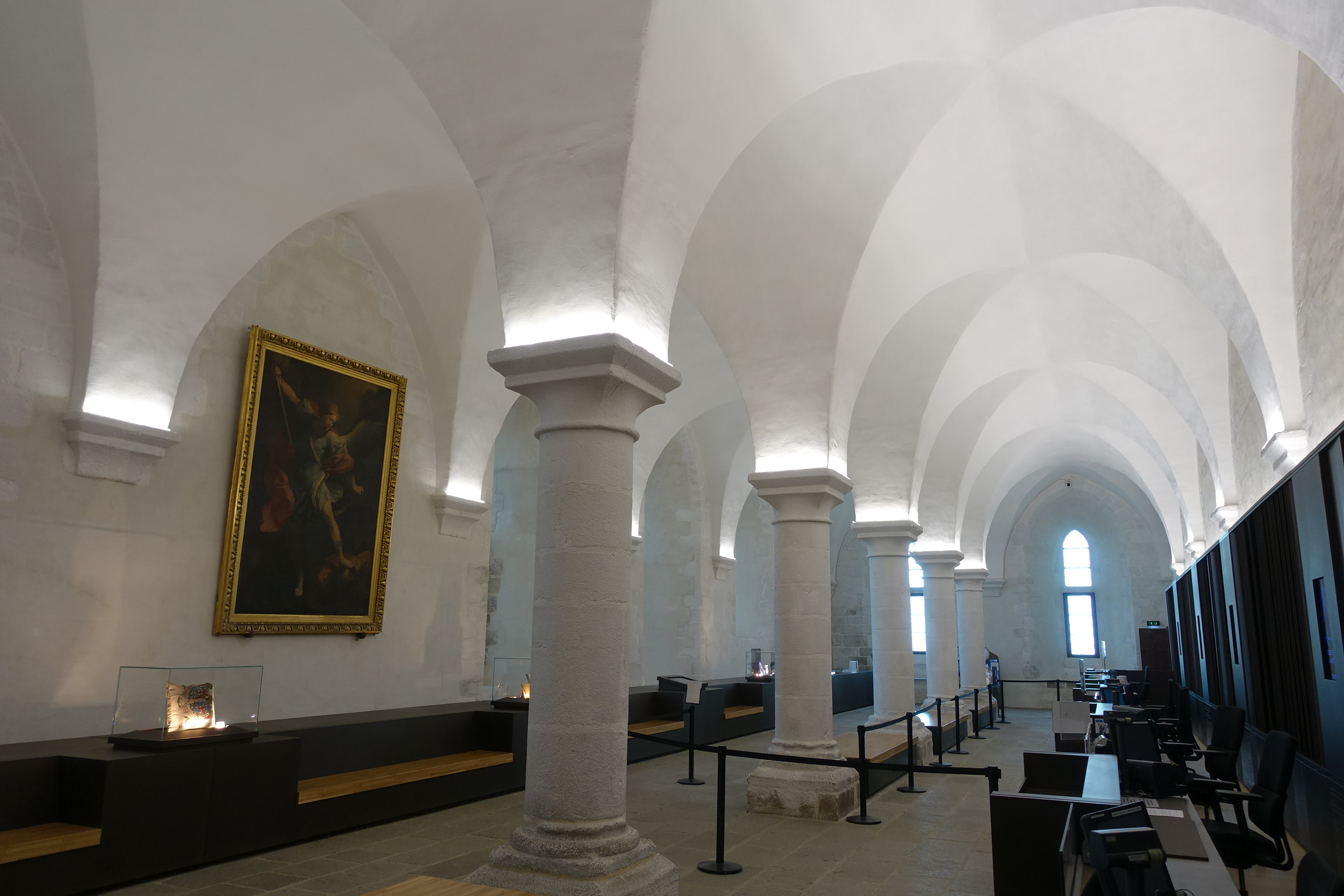 Aumônerie (mont Saint-Michel, la Merveille)